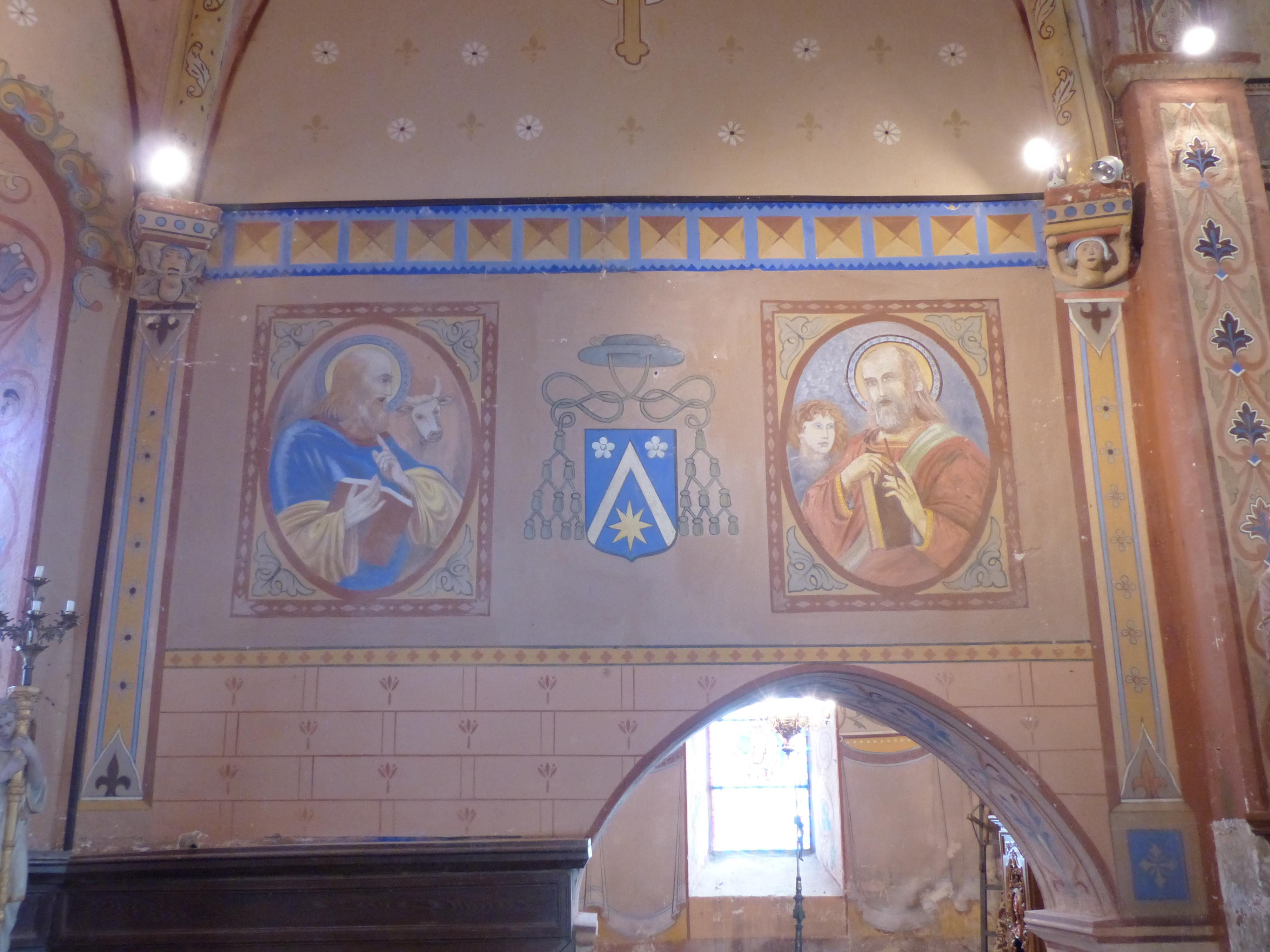 Église de Nades, Allier (France). Peintures murales du chœur (côté droit).